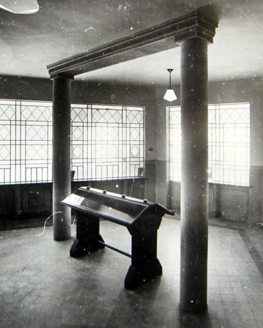 Colonne nell'atrio d'ingresso al piano terreno